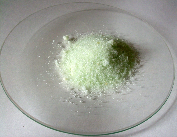 (NH4)2Fe(SO4)2